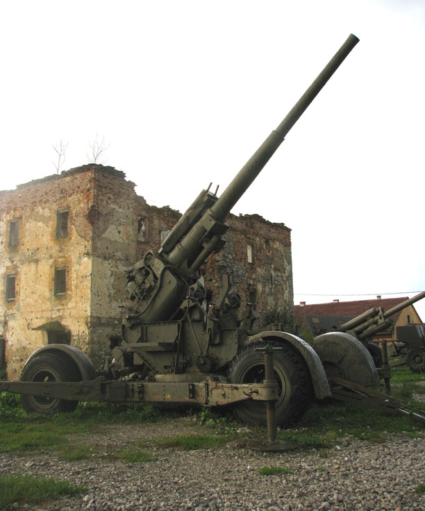 Protuzrakoplovni top M3 A-1, cal. 94,3 mm u Muzejskoj zbirci oružja iz Domovinskog rata, Turanj, Karlovac